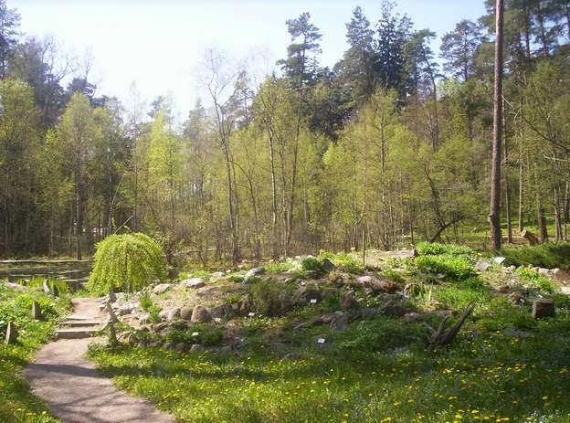 Arboretum w Kudypach. Ogródek skalny wiosną. 05 maja 2007.